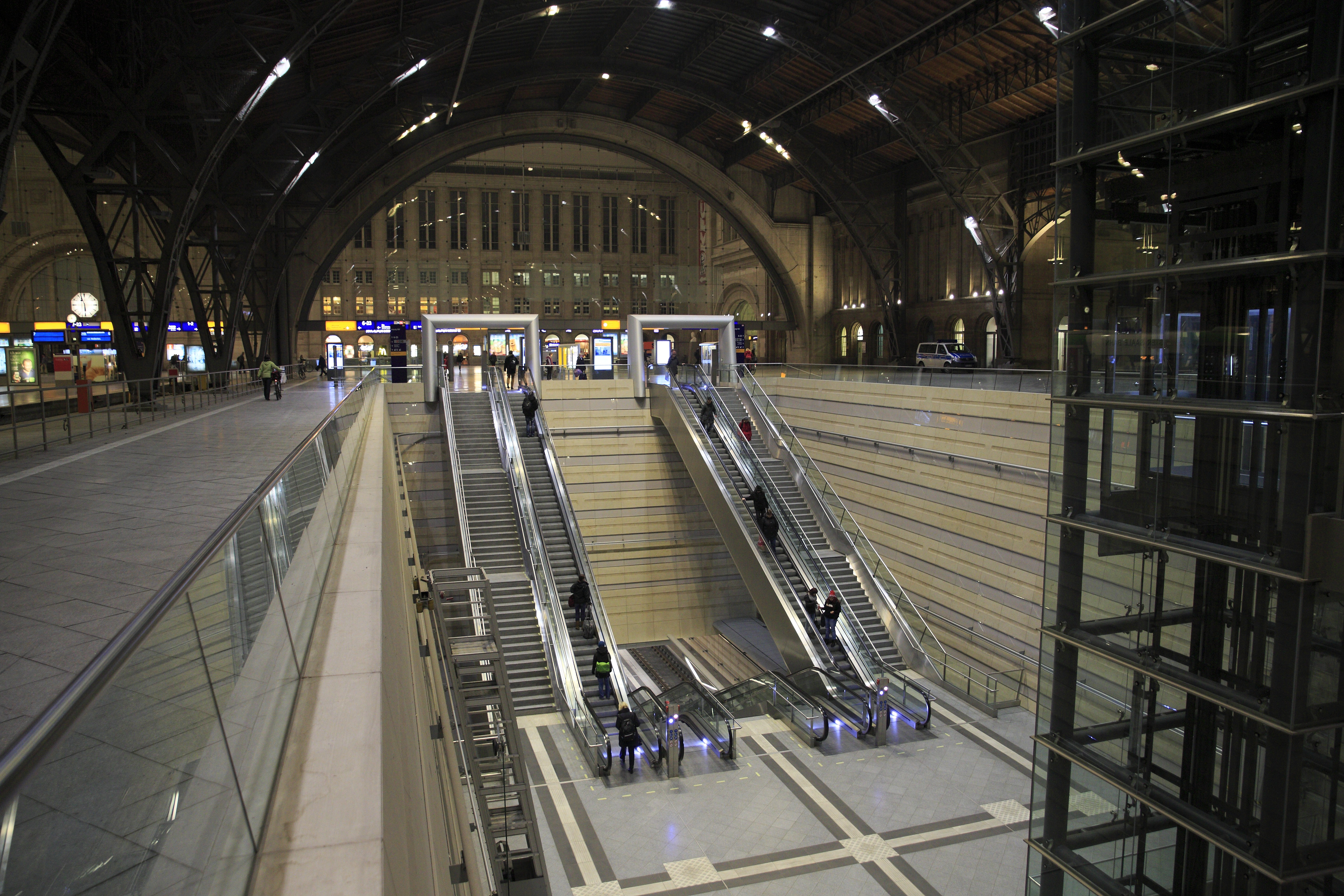 … in der westlichen Bahnsteighalle an Stelle der bisherigen Bahnsteiggleise 3 bis 5. Rechts der Aufzugsturm mit besonders langen Umsteigewegen. Blickrichtung zum Querbahnsteig.